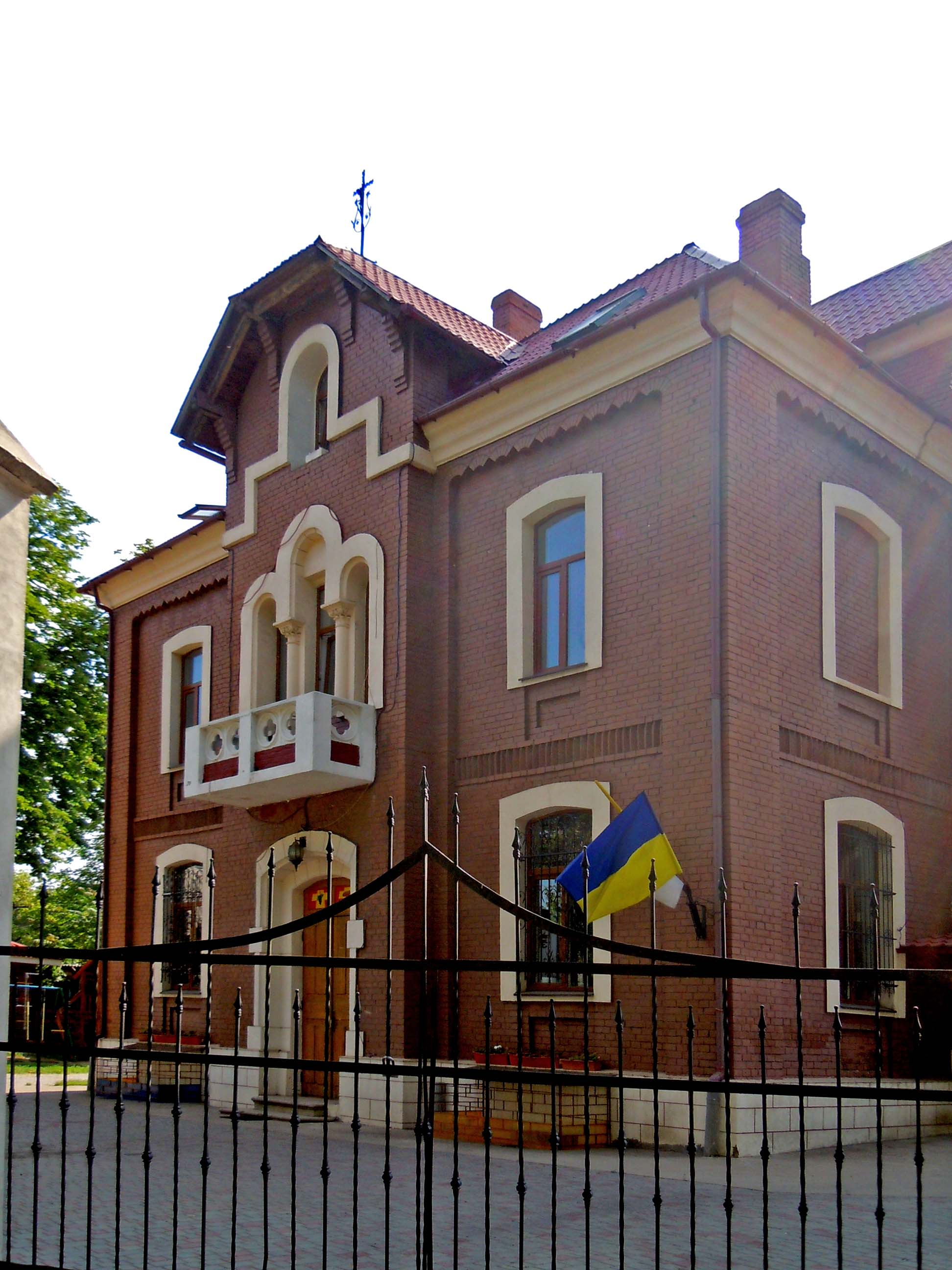 Церква Св. Клемента - залишилася від зруйнованого собору